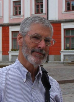 Walter Gulick. 25. mail 2010 Tartus